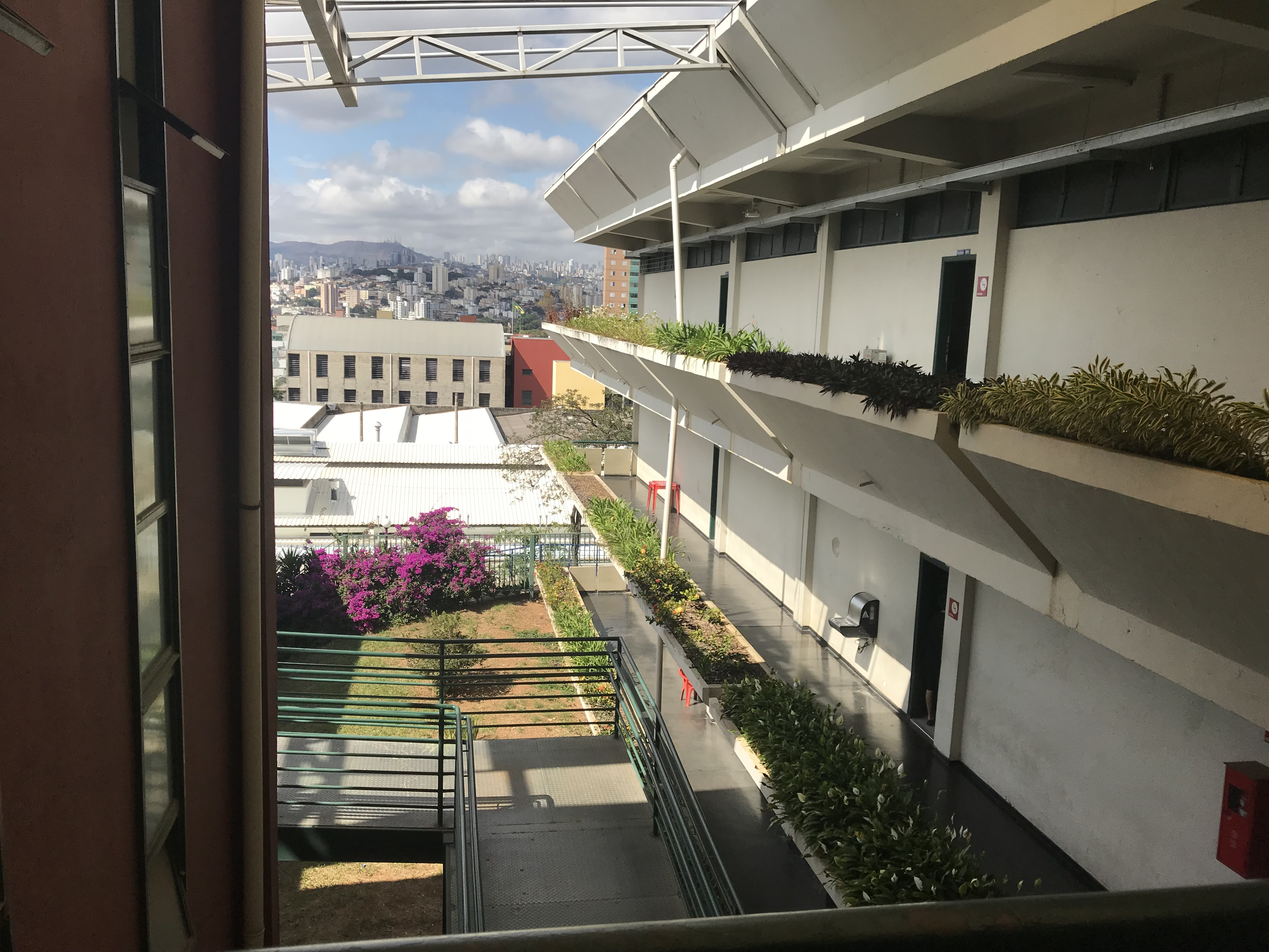 Imagem do Instituto de Ciências Biológicas e da Saúde da Pontifícia Universidade Católica de Minas Gerais, no campus Coração Eucarístico